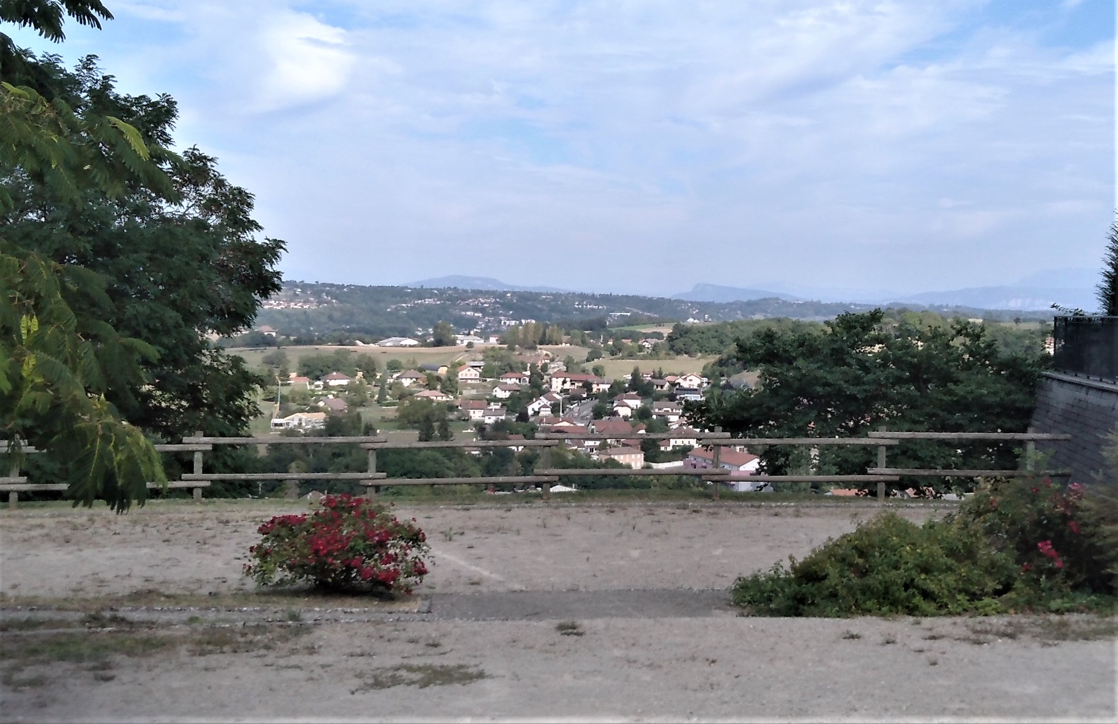 St Victor de Cessieu le bas vu du village